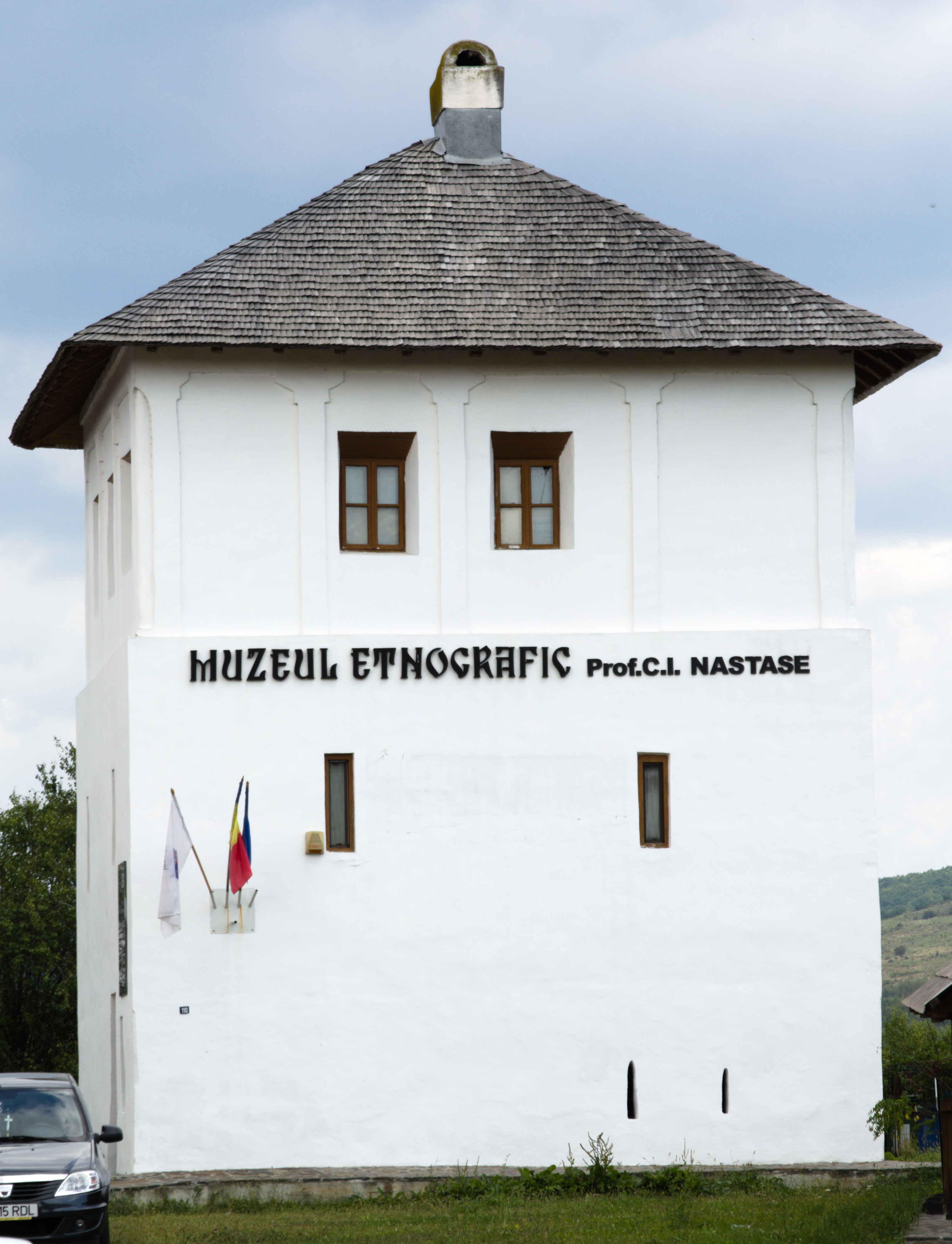 Cula_Racovita_Mioveni_Arges 01